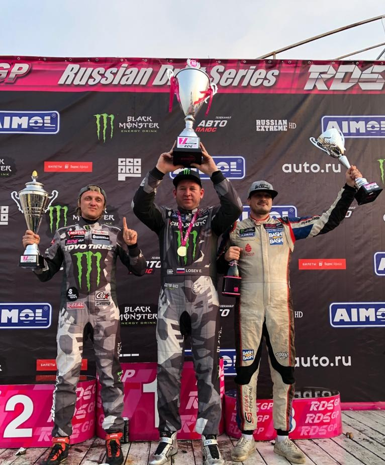 Команда Fail Crew на подиуме пятого этапа RDS GP